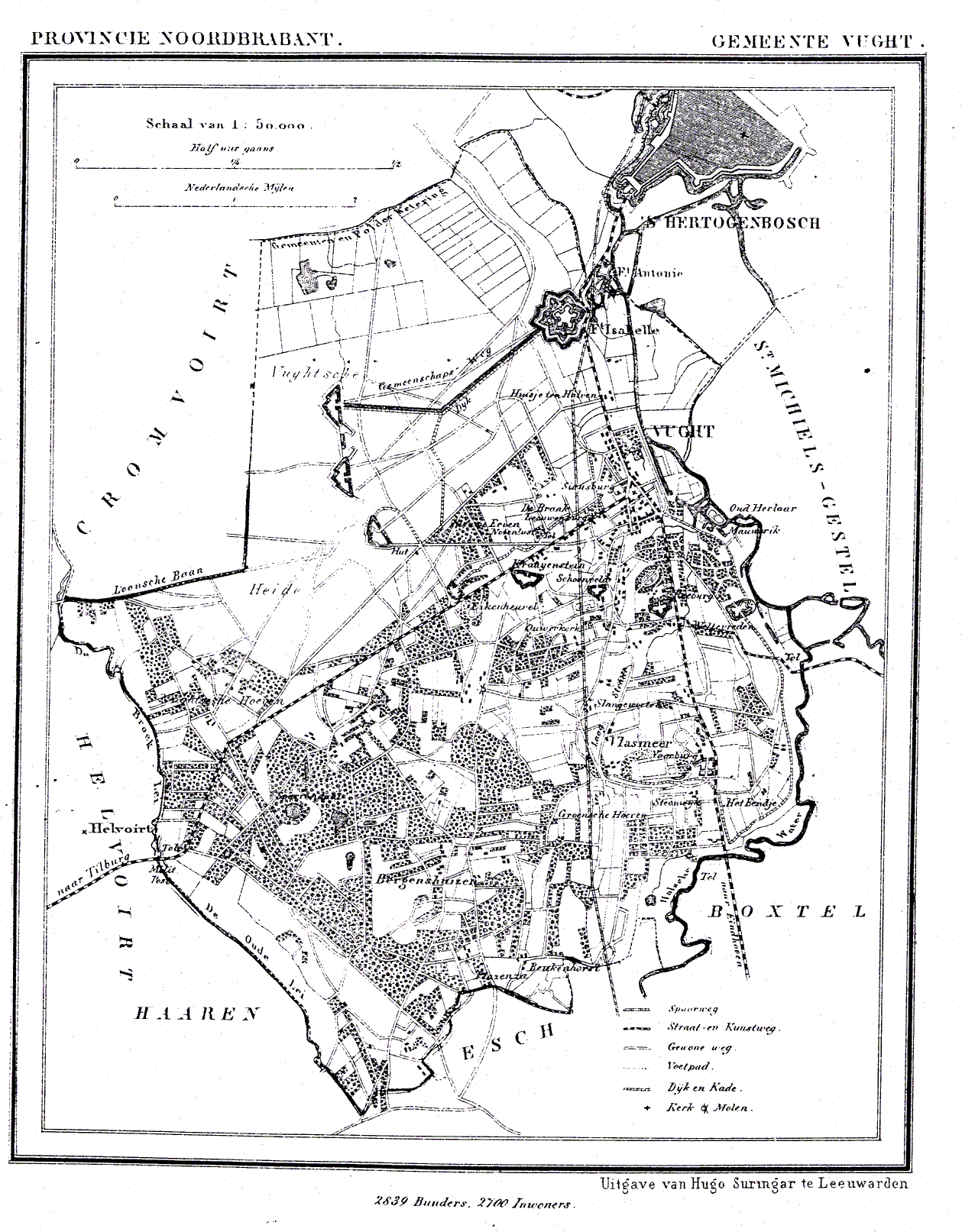 Nederland, Noord-Brabant, Gemeente Vught